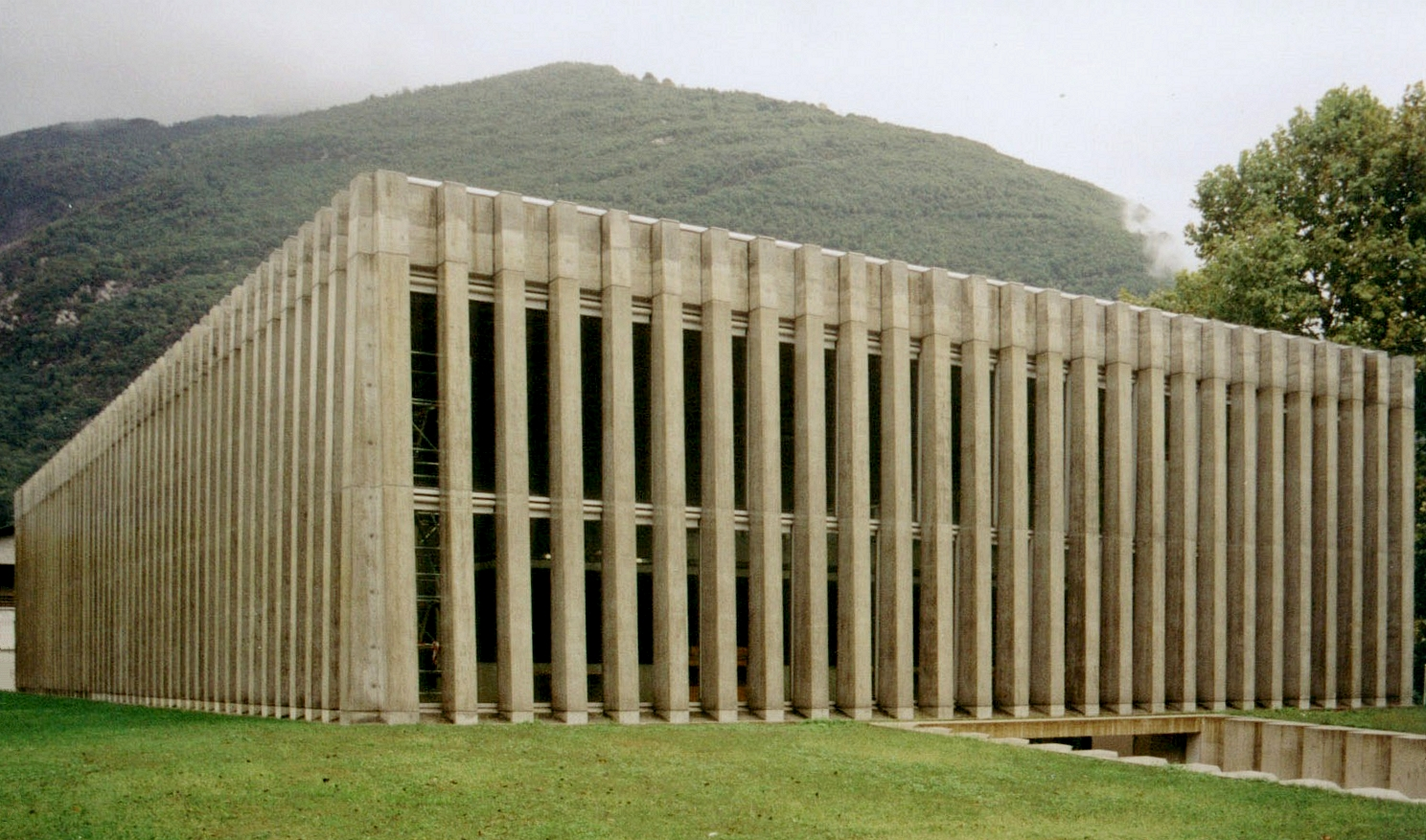 Losone, Palestra 1995-1997 (competition 1990)